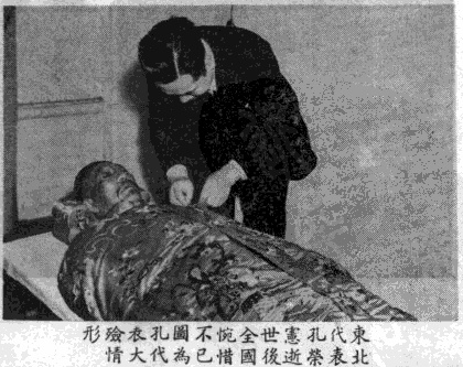 中文（台灣）: 第一屆國民大會專輯圖片